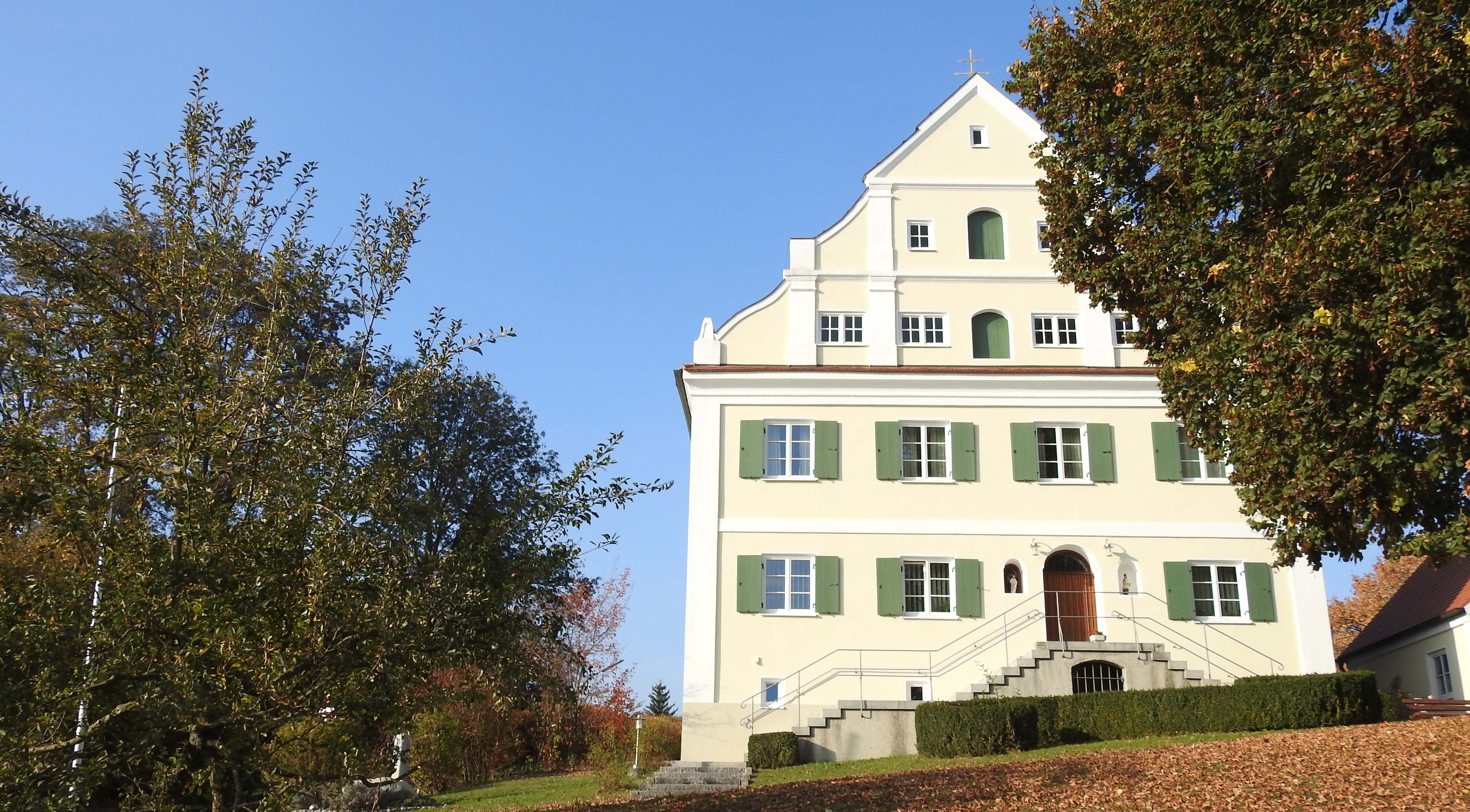 Pfarrhof in Adelzhausen